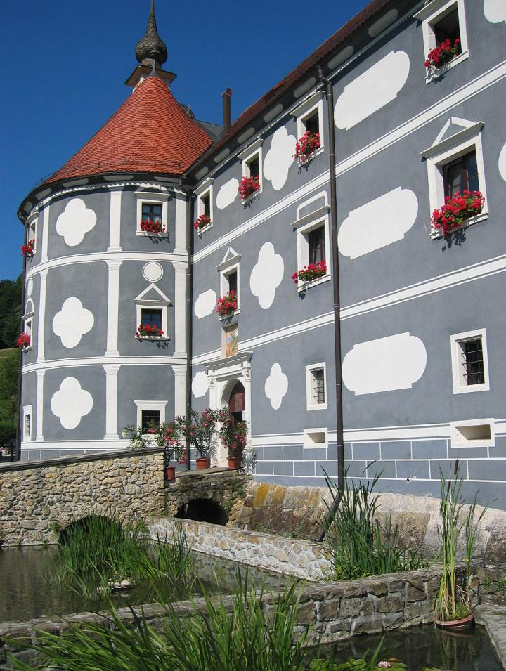 Olimje monastery, Slovenia photo:Ziga 21:29, 12 August 2006 (UTC)